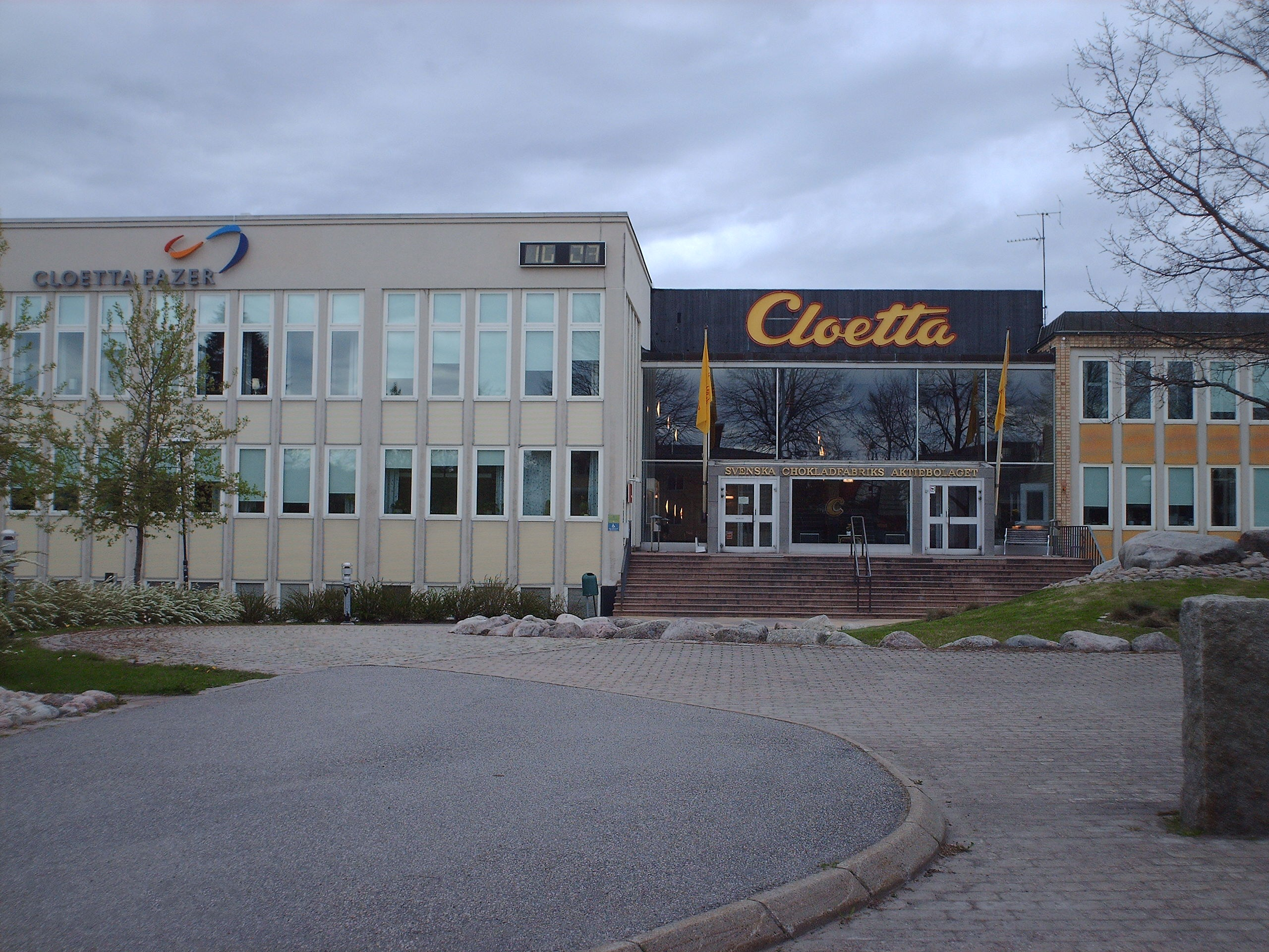 Cloetta, Ljungsbro, Sweden.